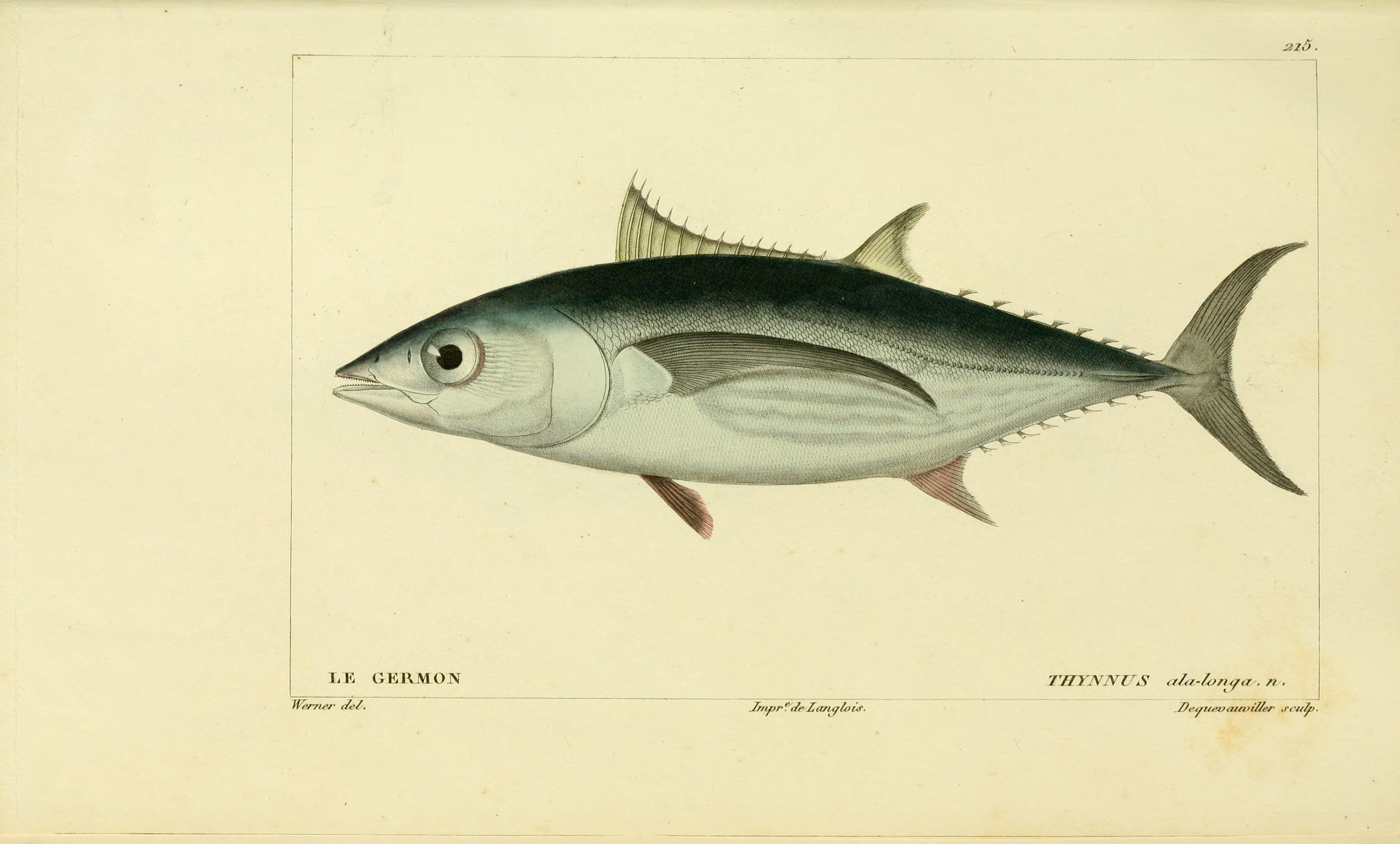 Thunnus alalunga